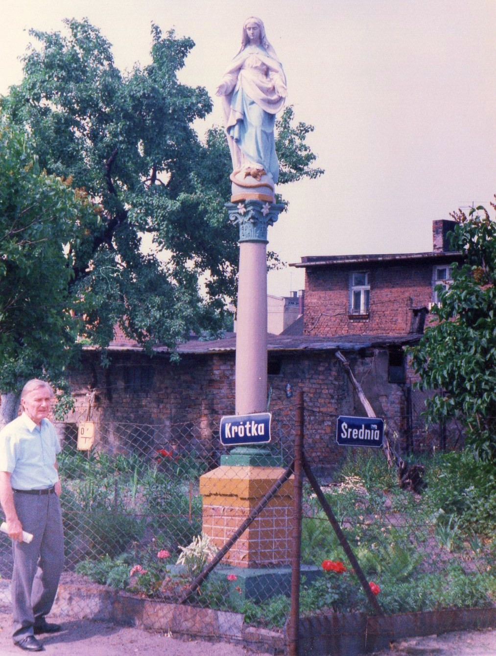 Ul. Średnia/Krótka - Poznań. Kapliczka maryjna.